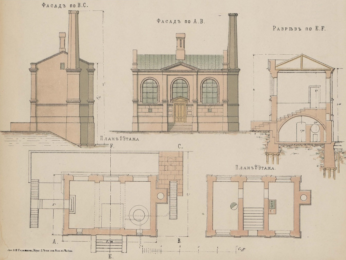 Водокачка Петербурго-Варшавской железной дороги